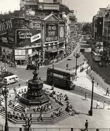 Piccadilly Circus 1972